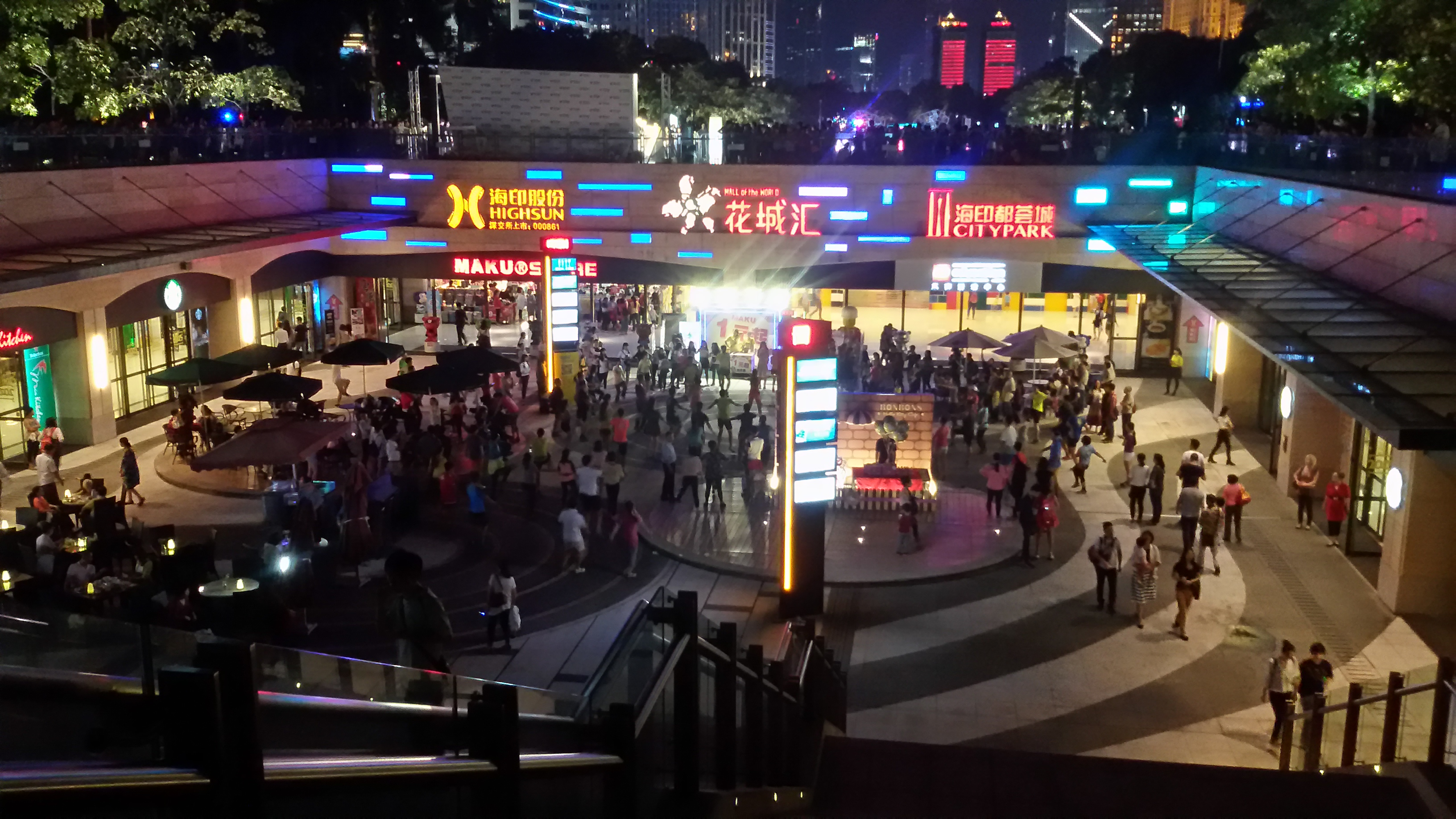 粵語: 花城汇